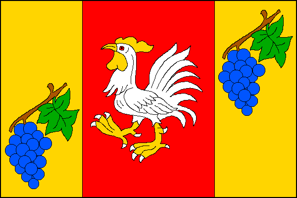 vlajka, Skalice, okres Znojmo